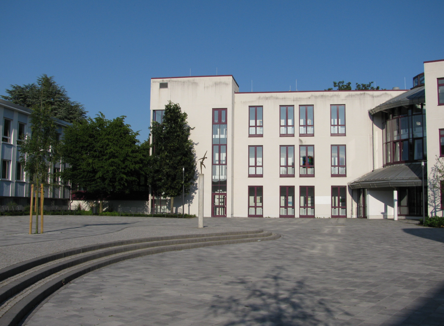 Landgraf-Ludwigs-Gymnasium Gießen, Haus D mit Skulptur, Quelle: Privatarchiv